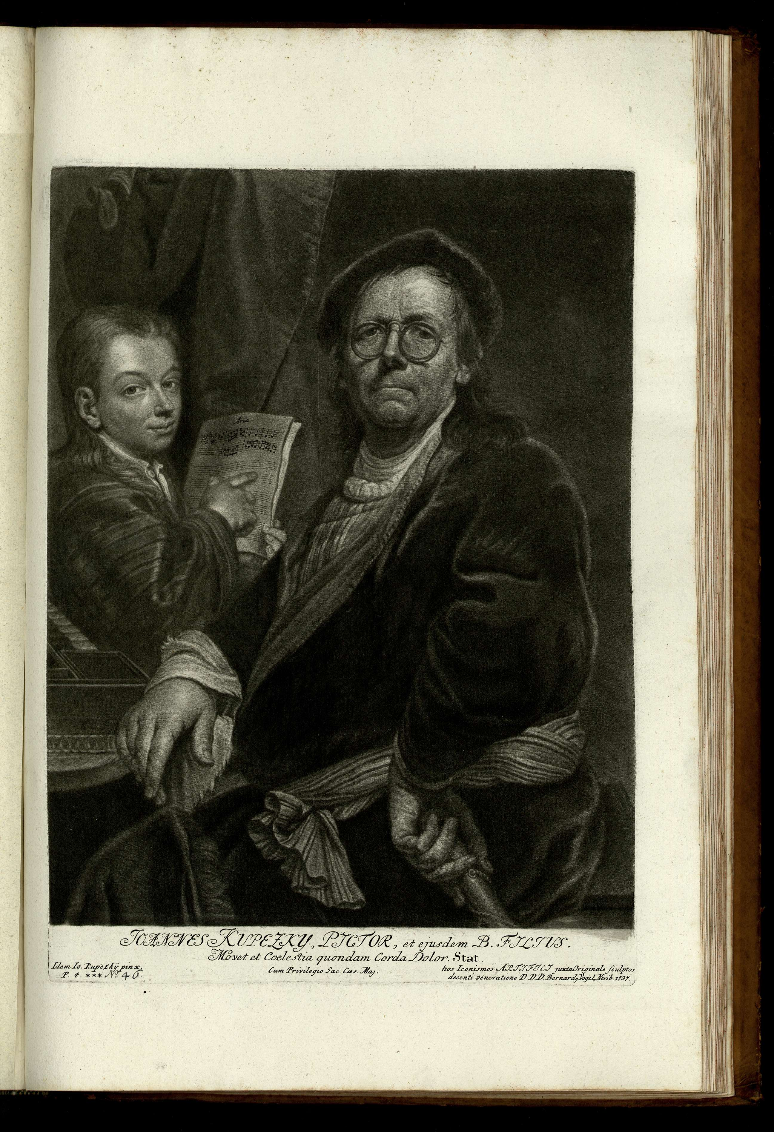 Jo. Kupezky Pictor, cum filio Chr. Jo. Frid. Selbstportrait Johann Kupetzky mit Sohn Kupferstiche von Bernhard Vogel, nach Gemälden von Johann Kupetzky. Herausgegeben Nürnberg 1745.